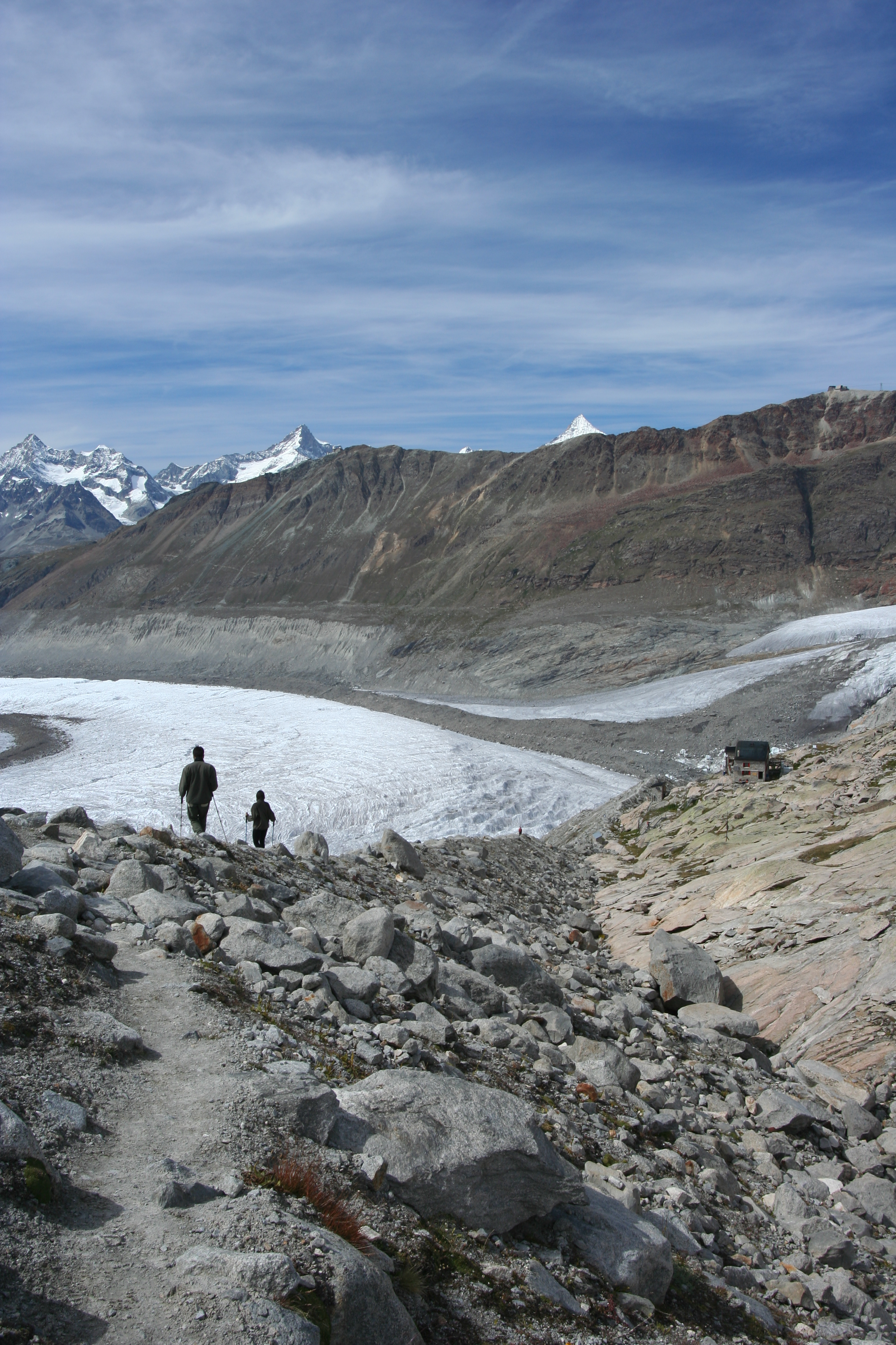 Monte Rosa Hut (2795 metres), Gorner and Grenz glaciers.